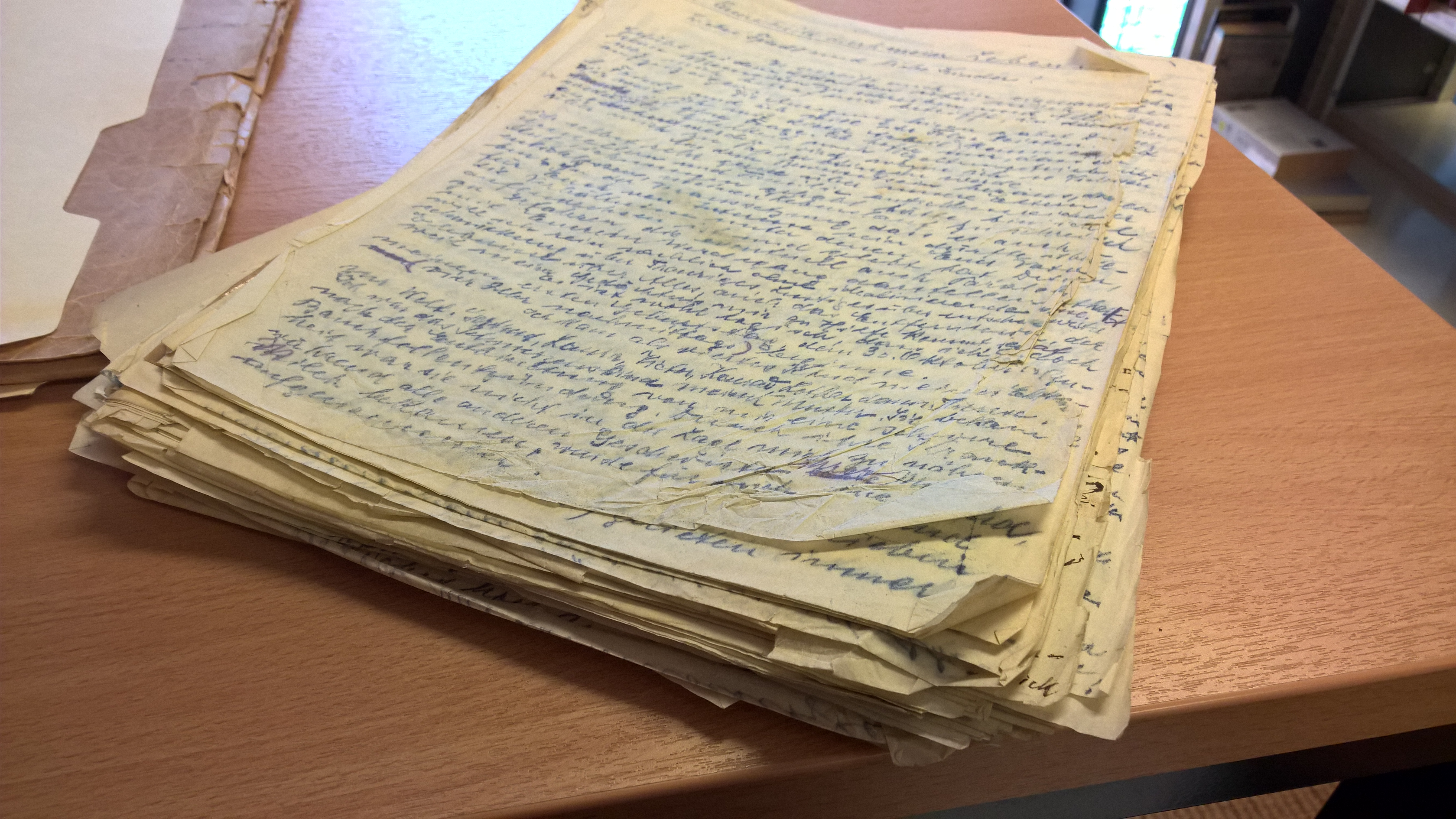 Autobiographische Schrift aus dem Nachlass